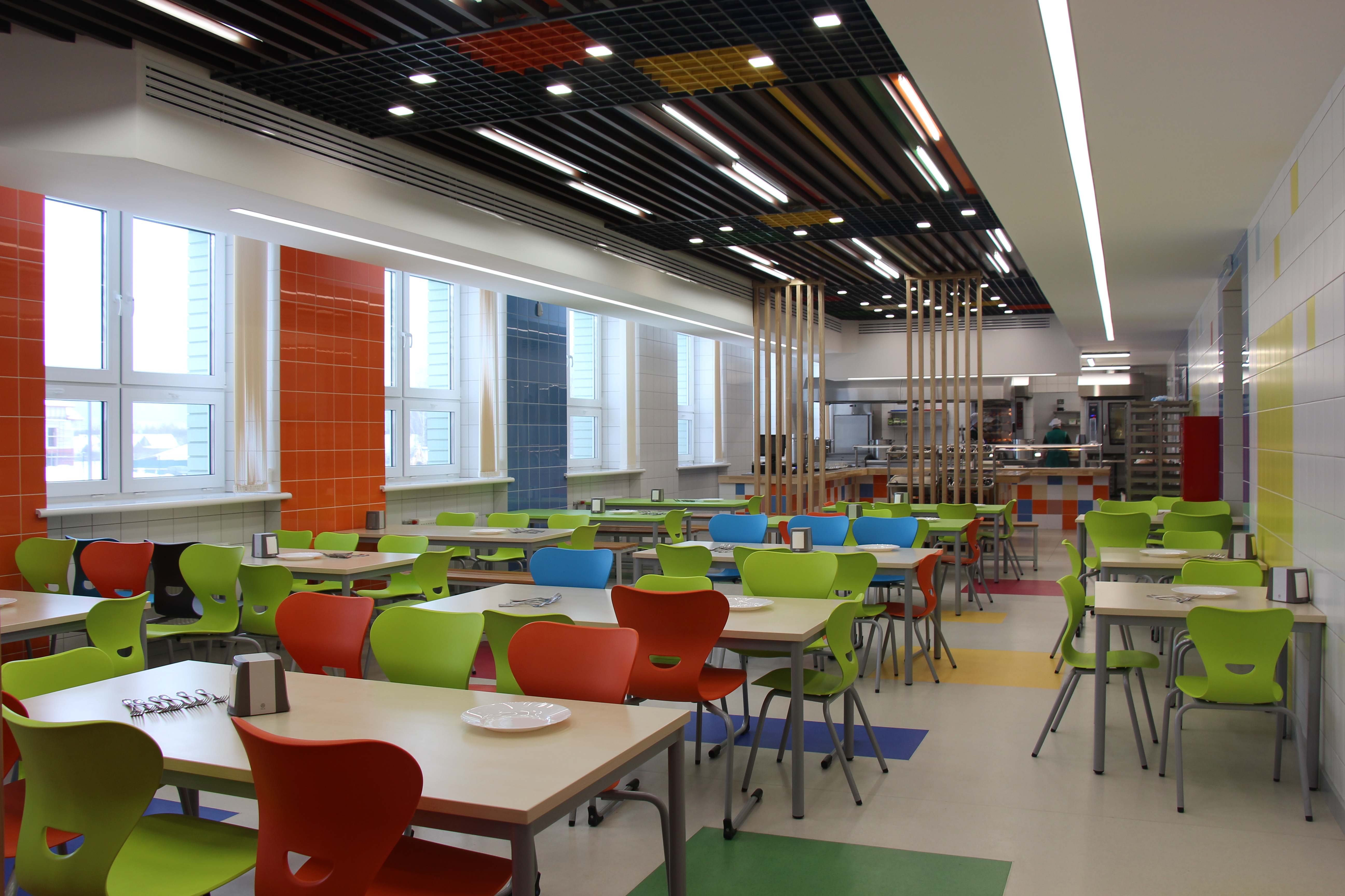 Ліцей Радовель